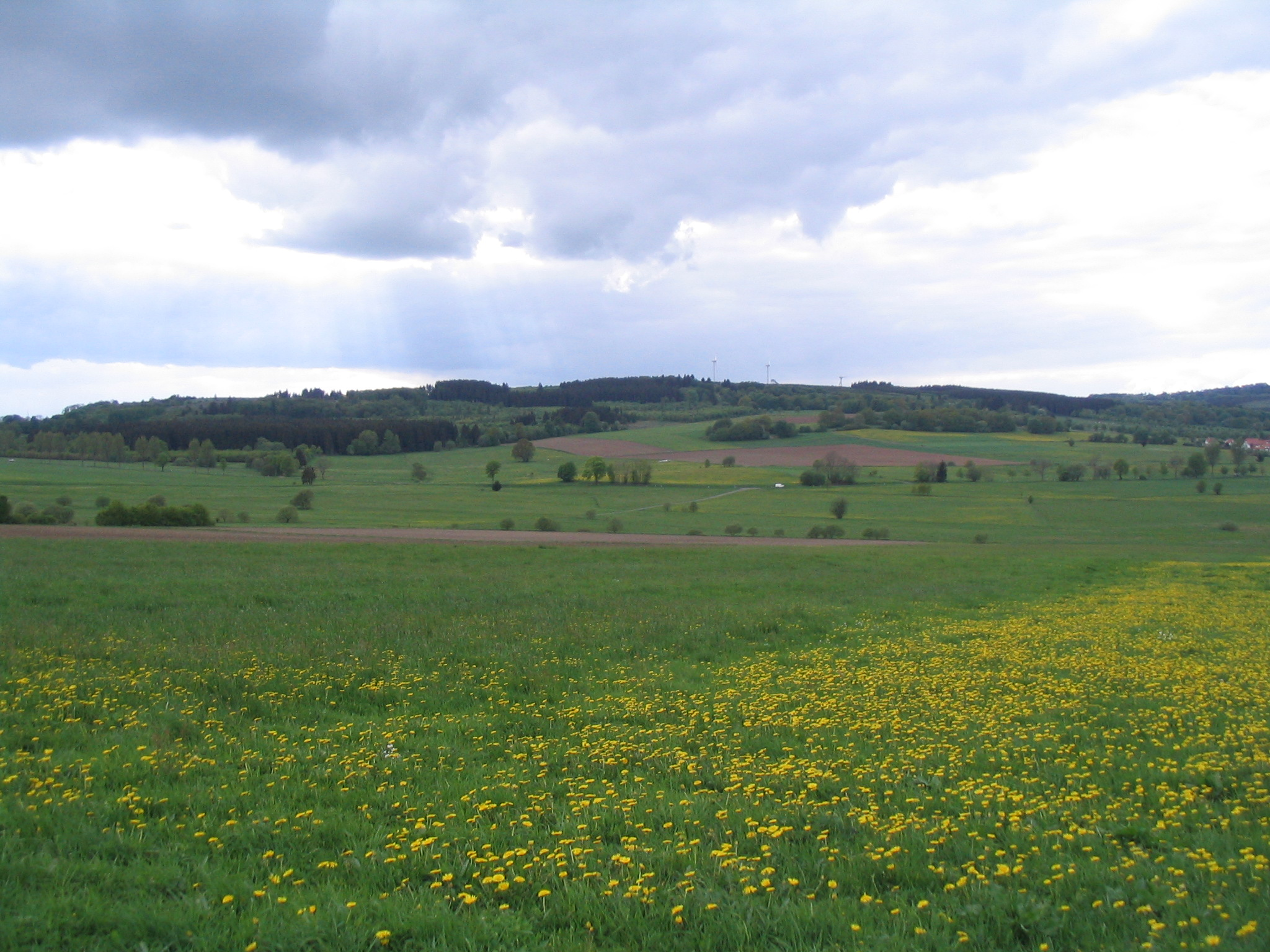 Der Weiße Stein (607 m) bei Bermuthshain im Vogelsberg von Osten.